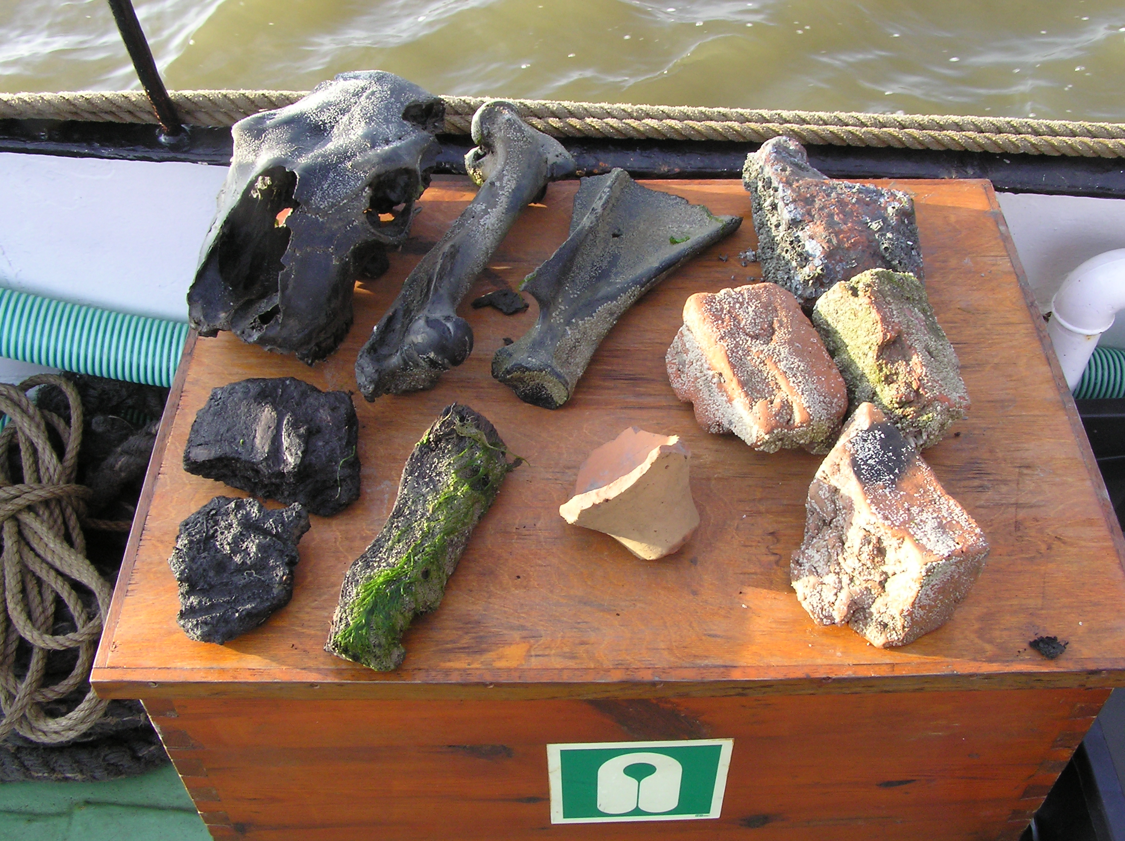 Fundstücke Rungholt (nördlich von Südfall)